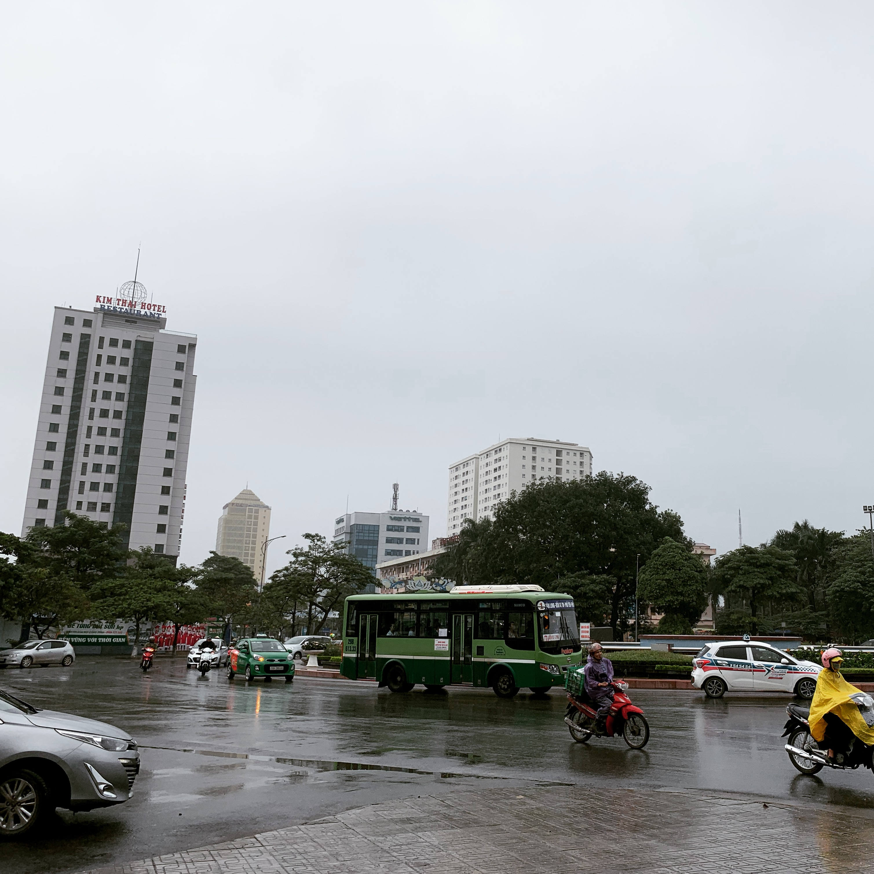 Một góc trung tâm thành phố Thái Nguyên hướng nhìn từ ngân hàng nhà nước sang đường Hoàng Văn Thụ